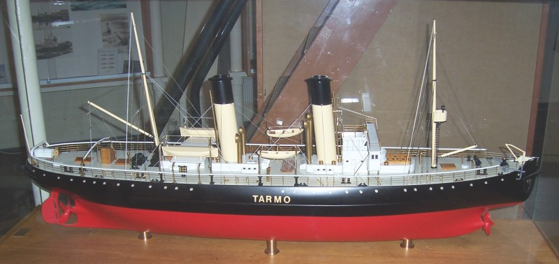 Eisbrecher Tarmo 14. Mai 2006, Modell in der Ausstellung